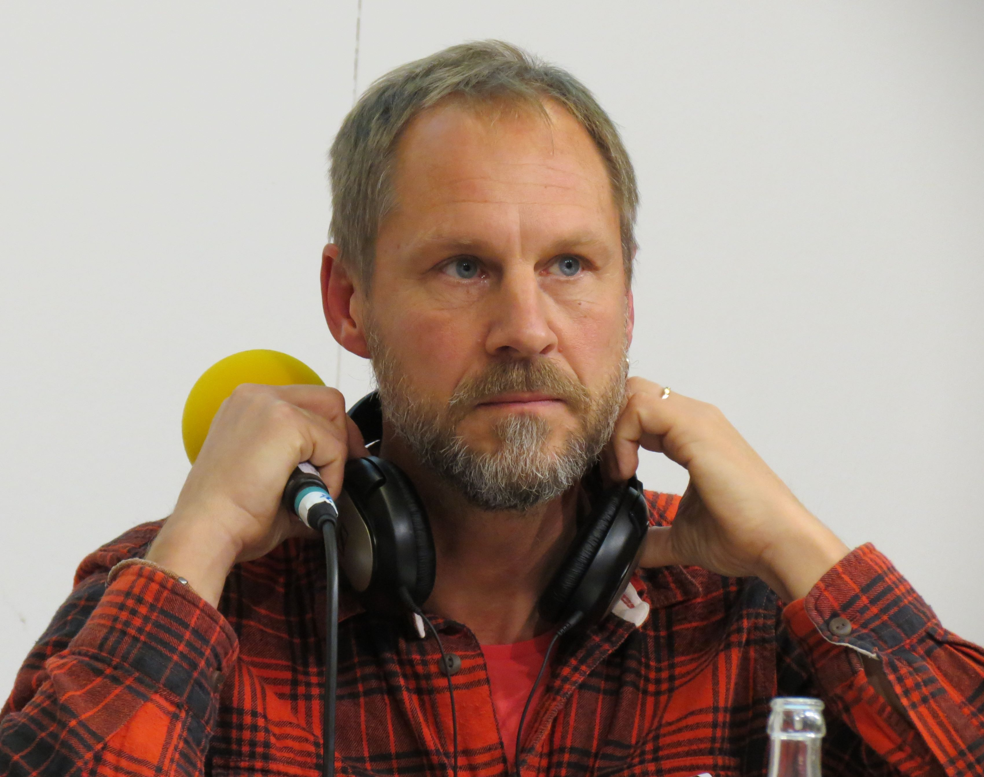 Barnboksförfattaren Per Gustavsson intervjuas i P4 Göteborg/Väst på Bokmässan 2013.